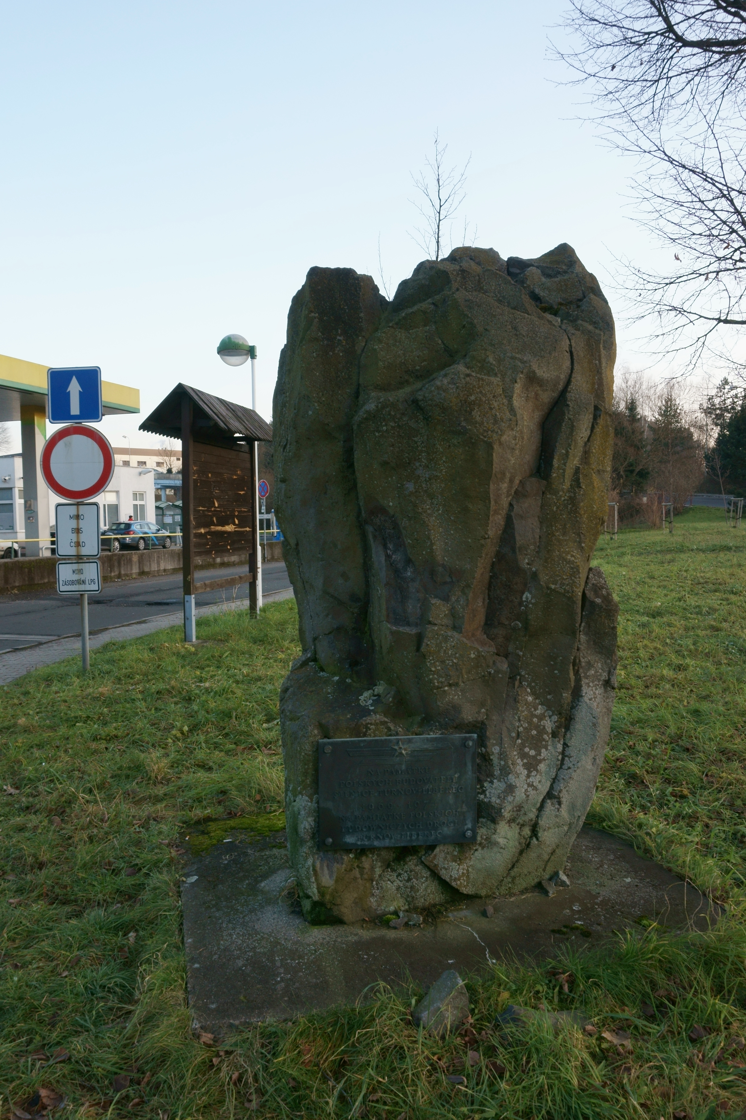 pomník stavby silnice Turnov-Liberec